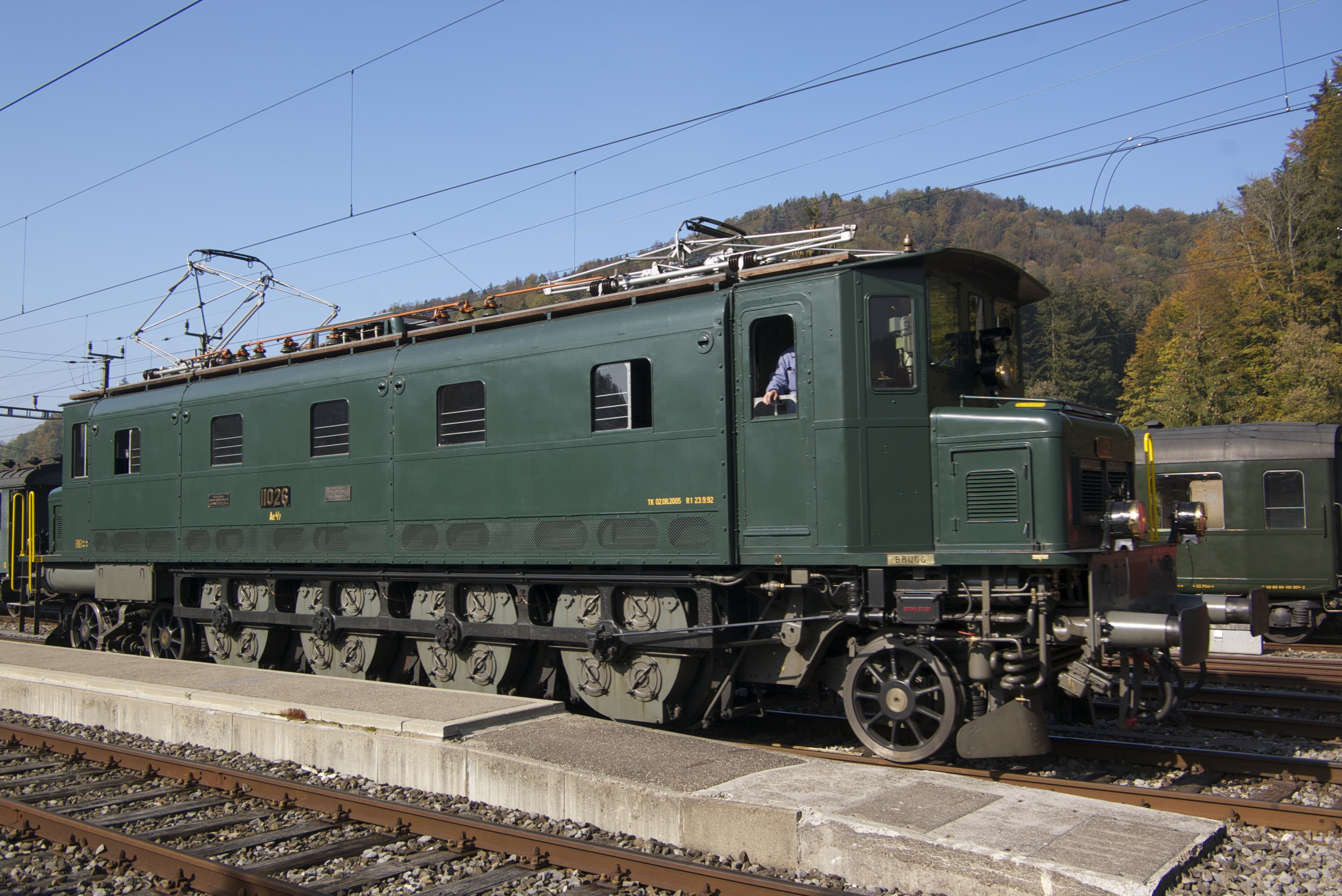 Locomotive Ae 4/7 11026 im Bahnhof Bauma.